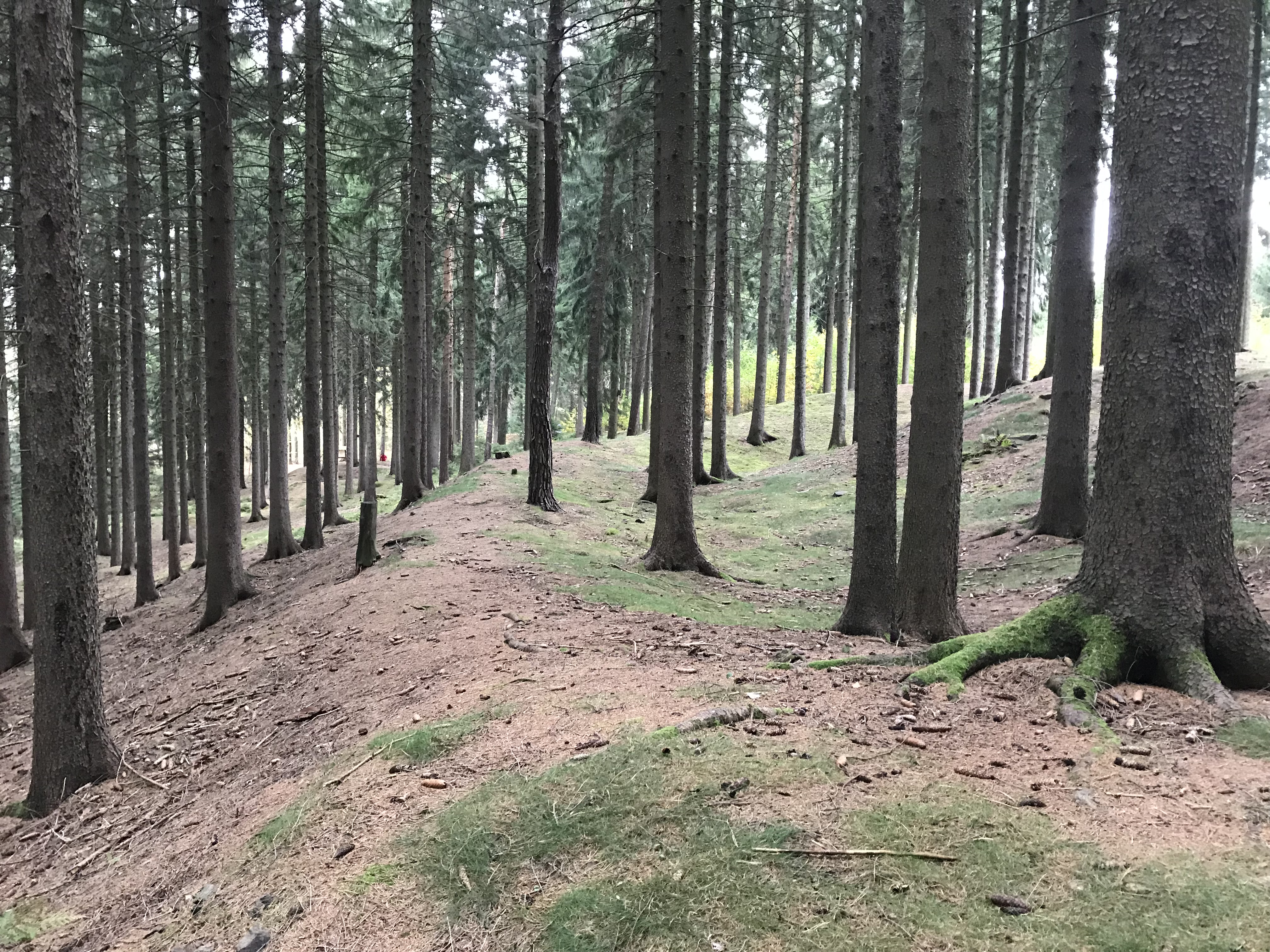 Wallanlage der ehemaligen Burg